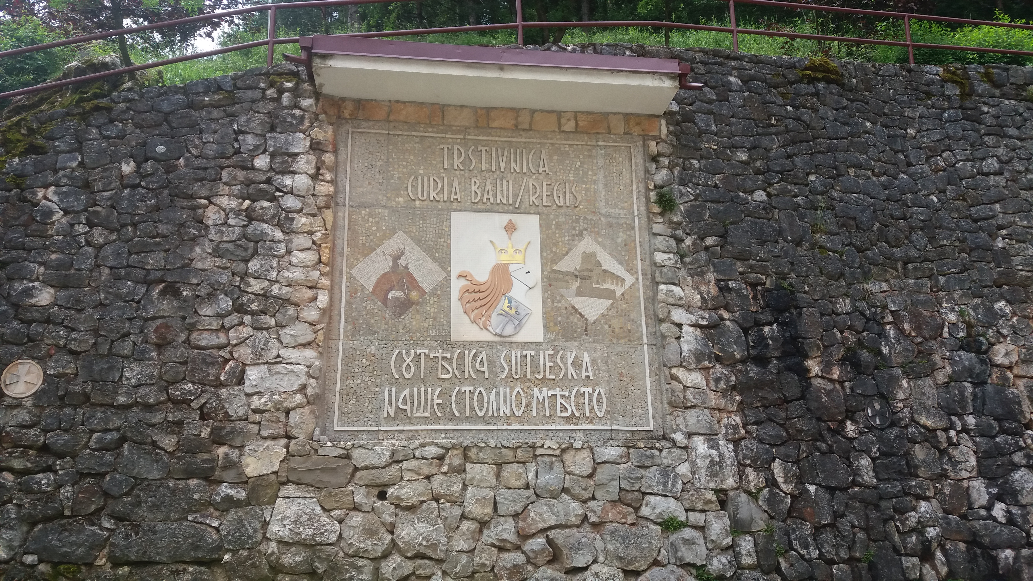 Ploča ispred samostana Kraljeva Sutjeska